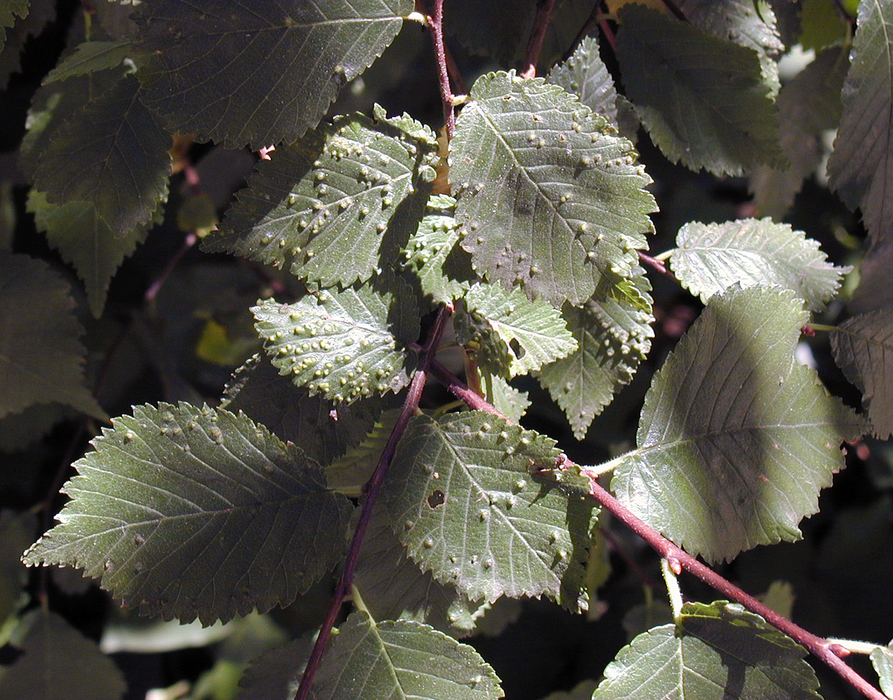 Agallas de Eriophyes ulmicola (=Aceria ulmicola), fam. Eriophyidae, sobre hojas de Ulmus minor. Valladolid, parque del Campo Grande.